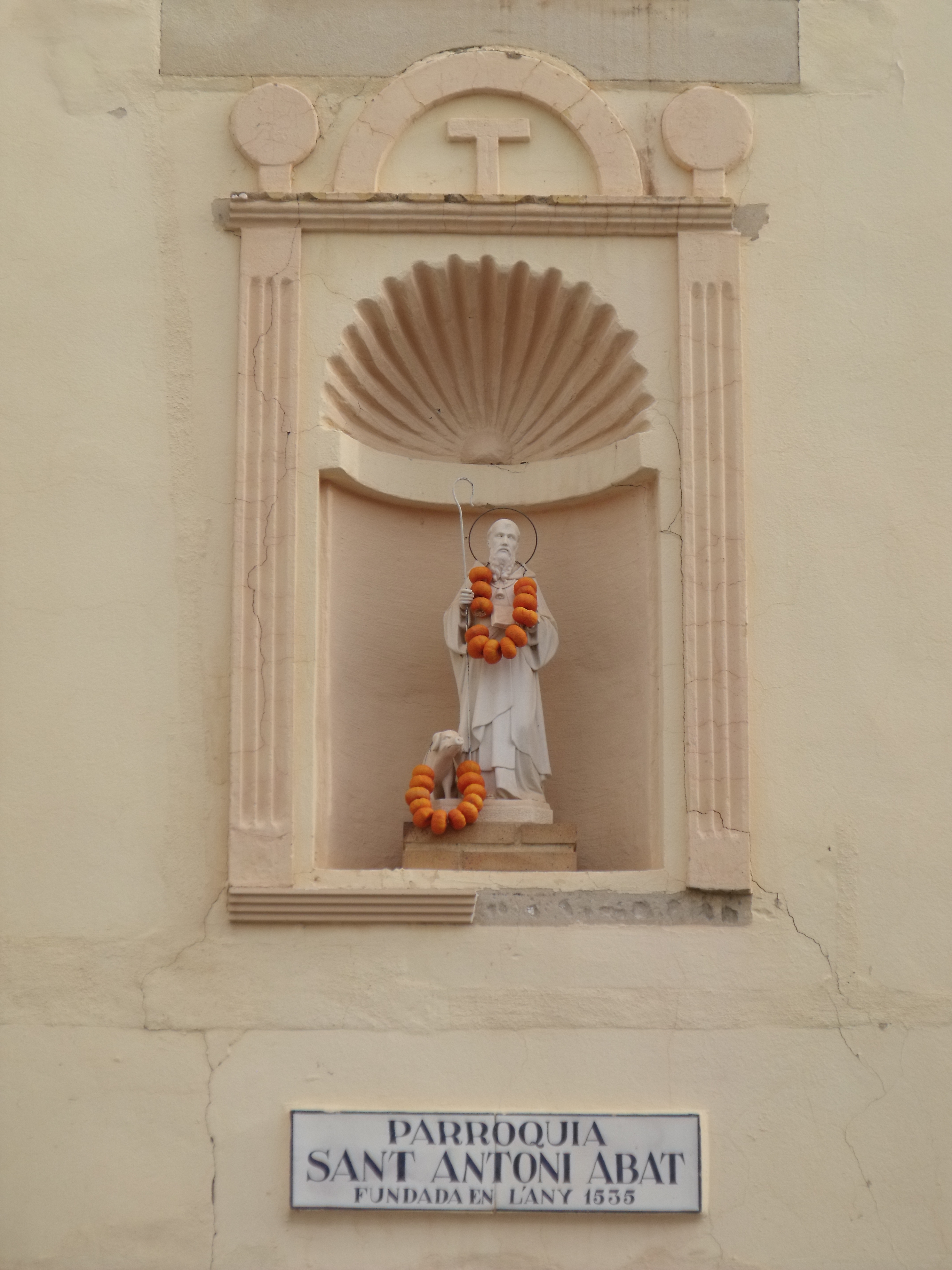 Fiesta de Sant Antoni del Porquet en Cerdà